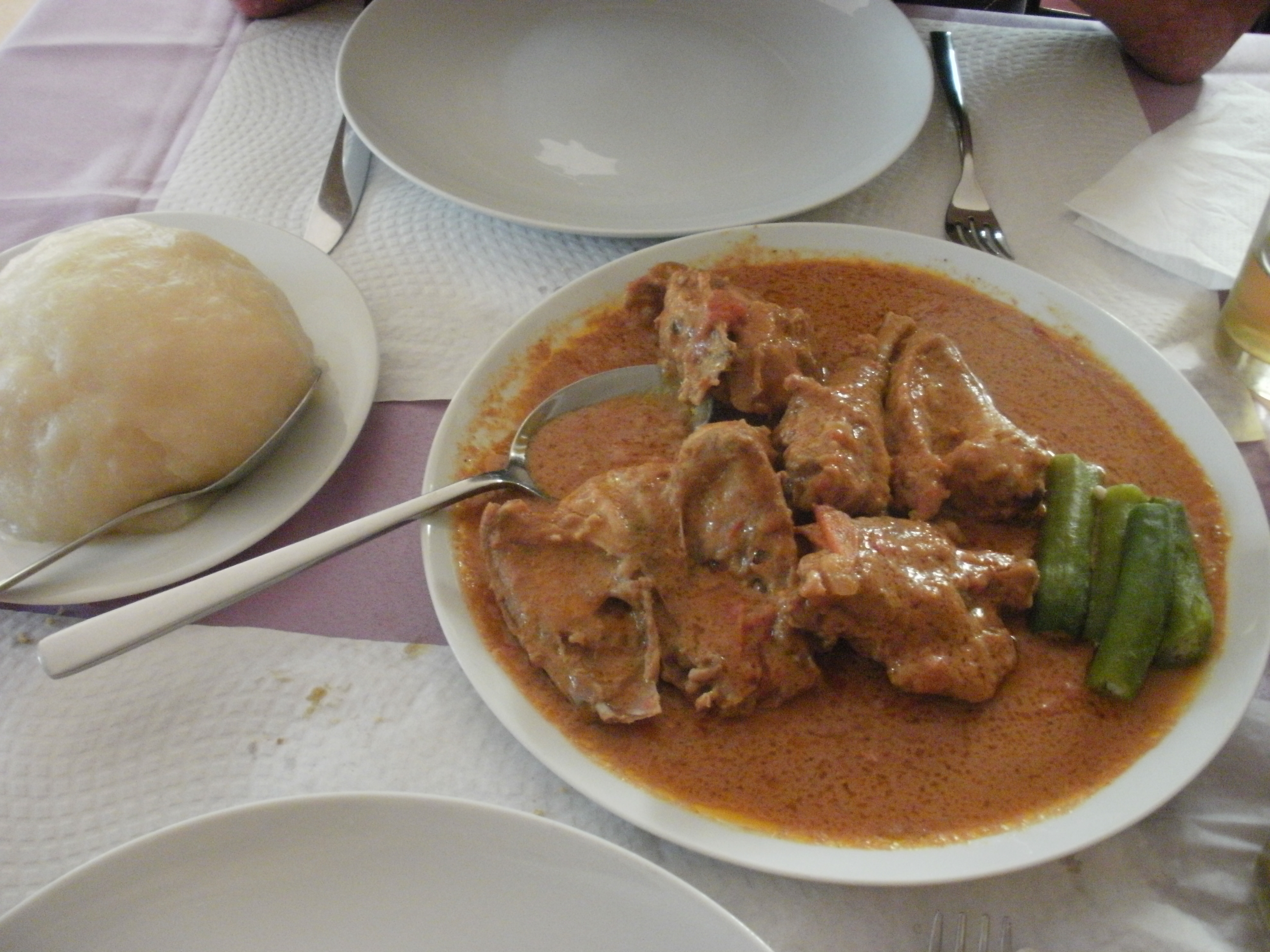 Cabidela de galinha rija, acompanhada de funje de mandioca